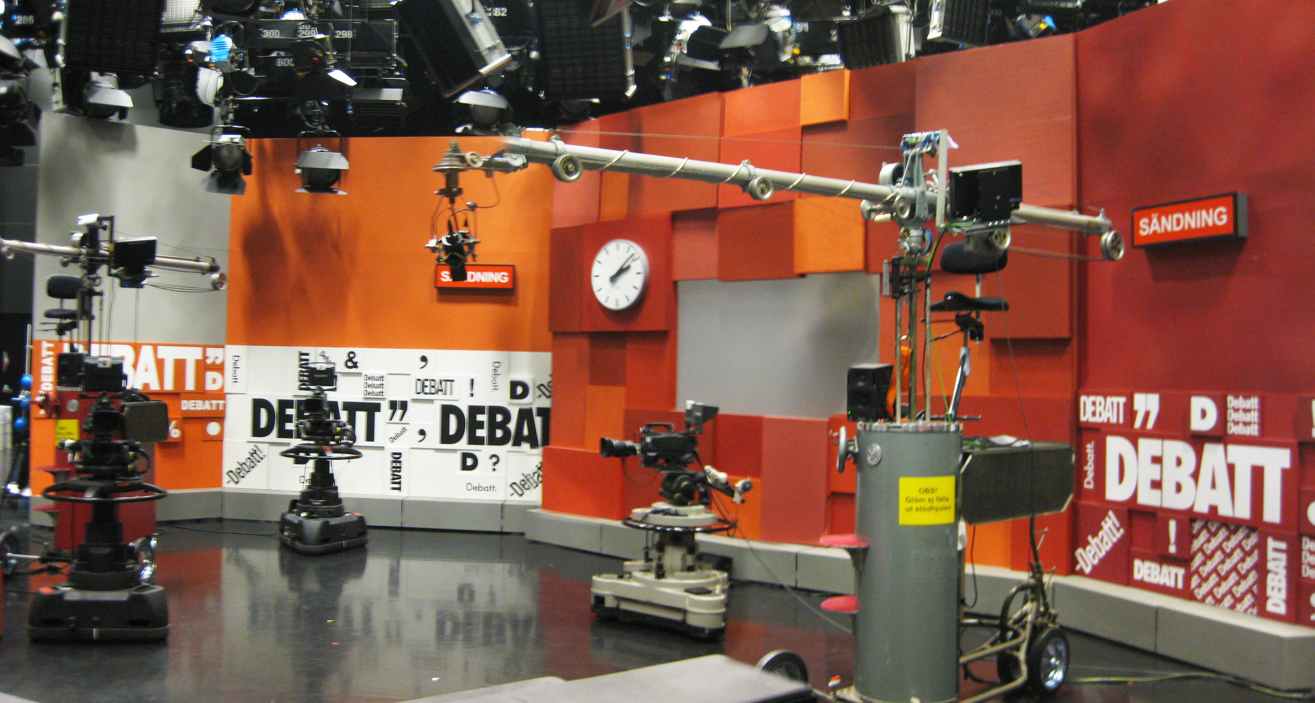 Studion på Sveriges Television i Göteborg, med scenografin till TV-programmet Debatt. Scenografin är skapad av Robert Komarek.